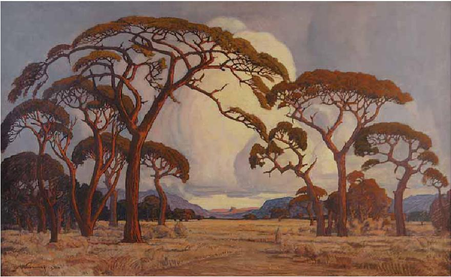 Pierneef: A summer afternoon, Bushveld